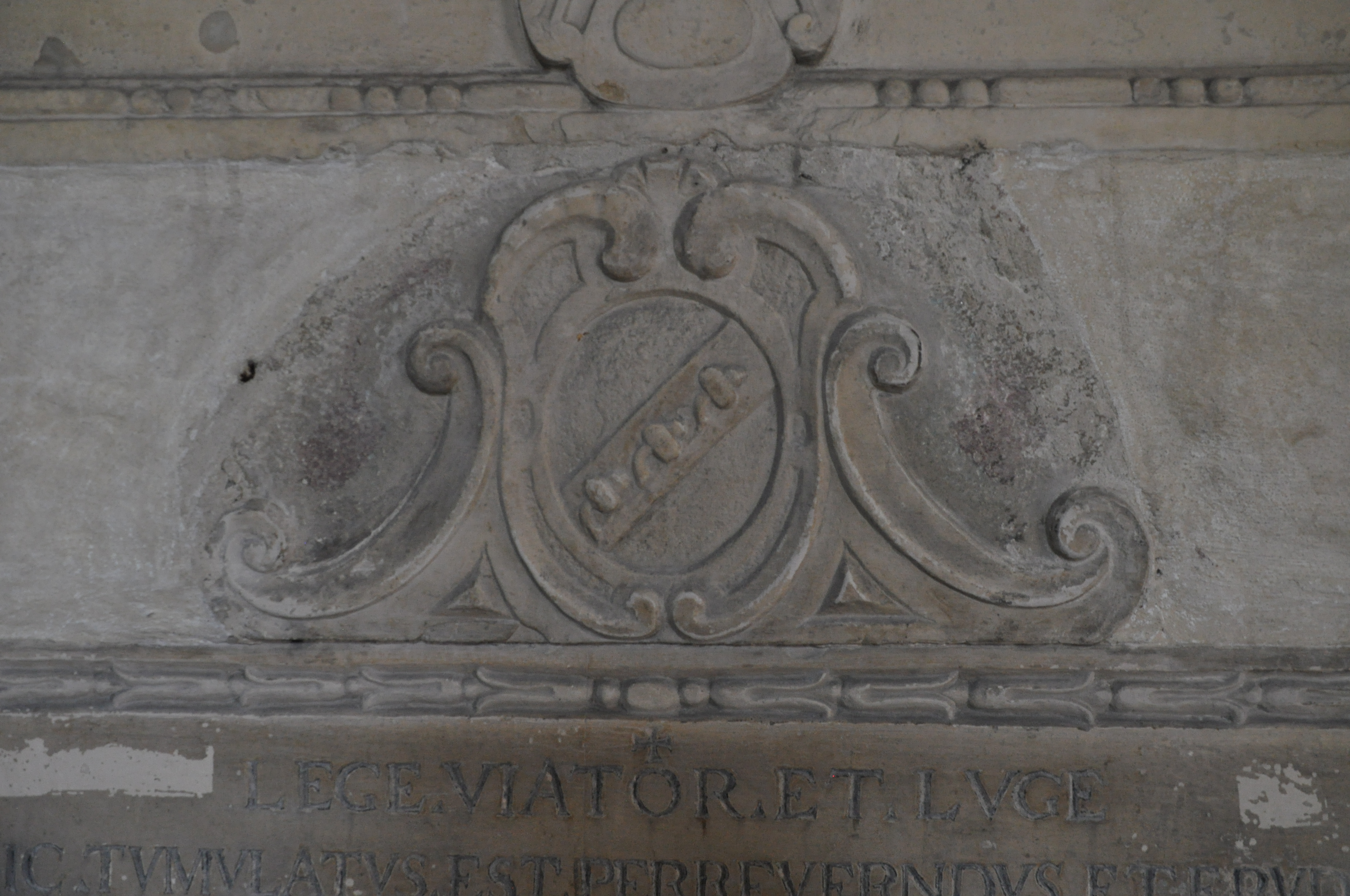 Augsburg, Dom, Kreuzgang, Nordflügel, 8. Joch, Epitaph für Gregor Aichinger (* 1564; † 21. Januar 1628), Domkapellmeister und Komponist; Kosel Nr. 232; Solnhofener Stein; Detail: Wappen (redendes Wappen)